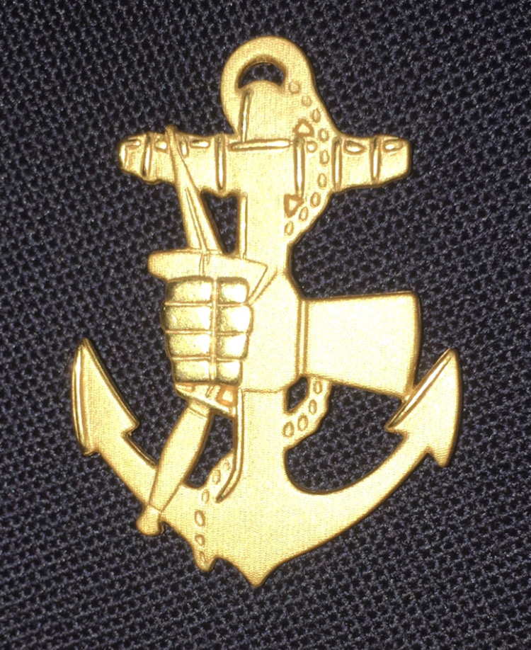 Utbildningstecken "Bassäk" till m/87